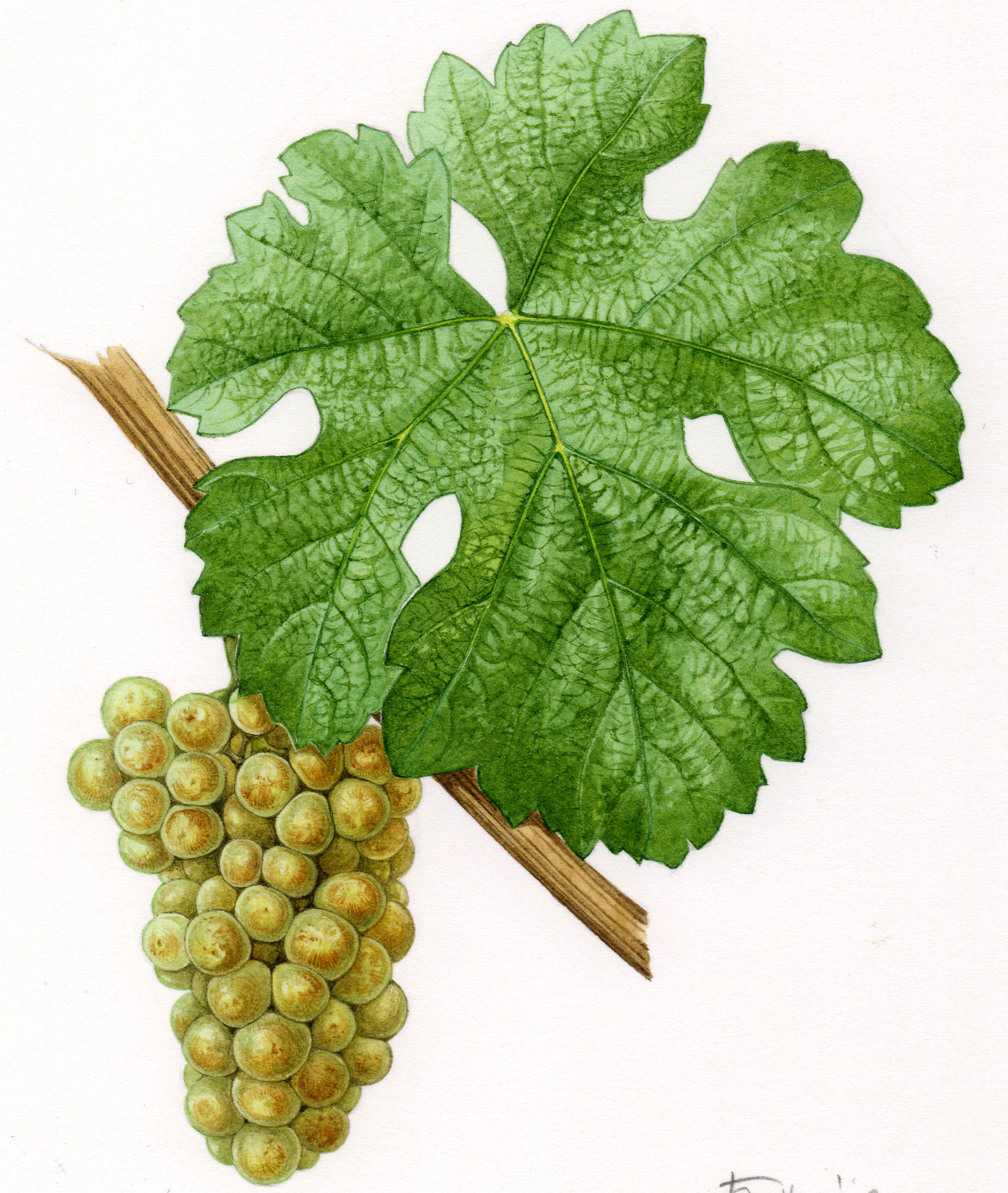 Aquarelle originale pour les Cépages de France (2001)